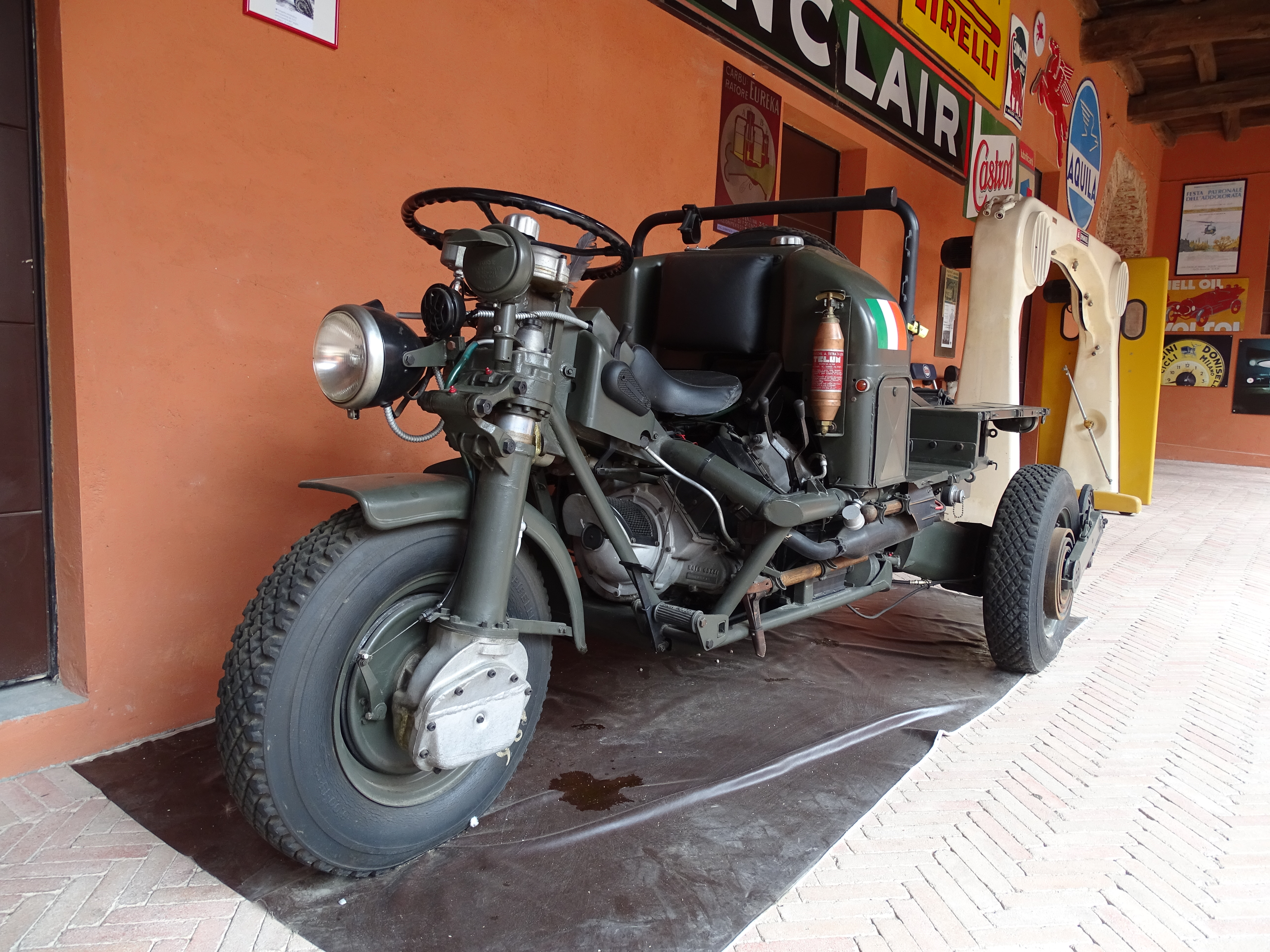 Un 'Mulo Meccanico' conservato presso il Museo Fisogni (Tradate)